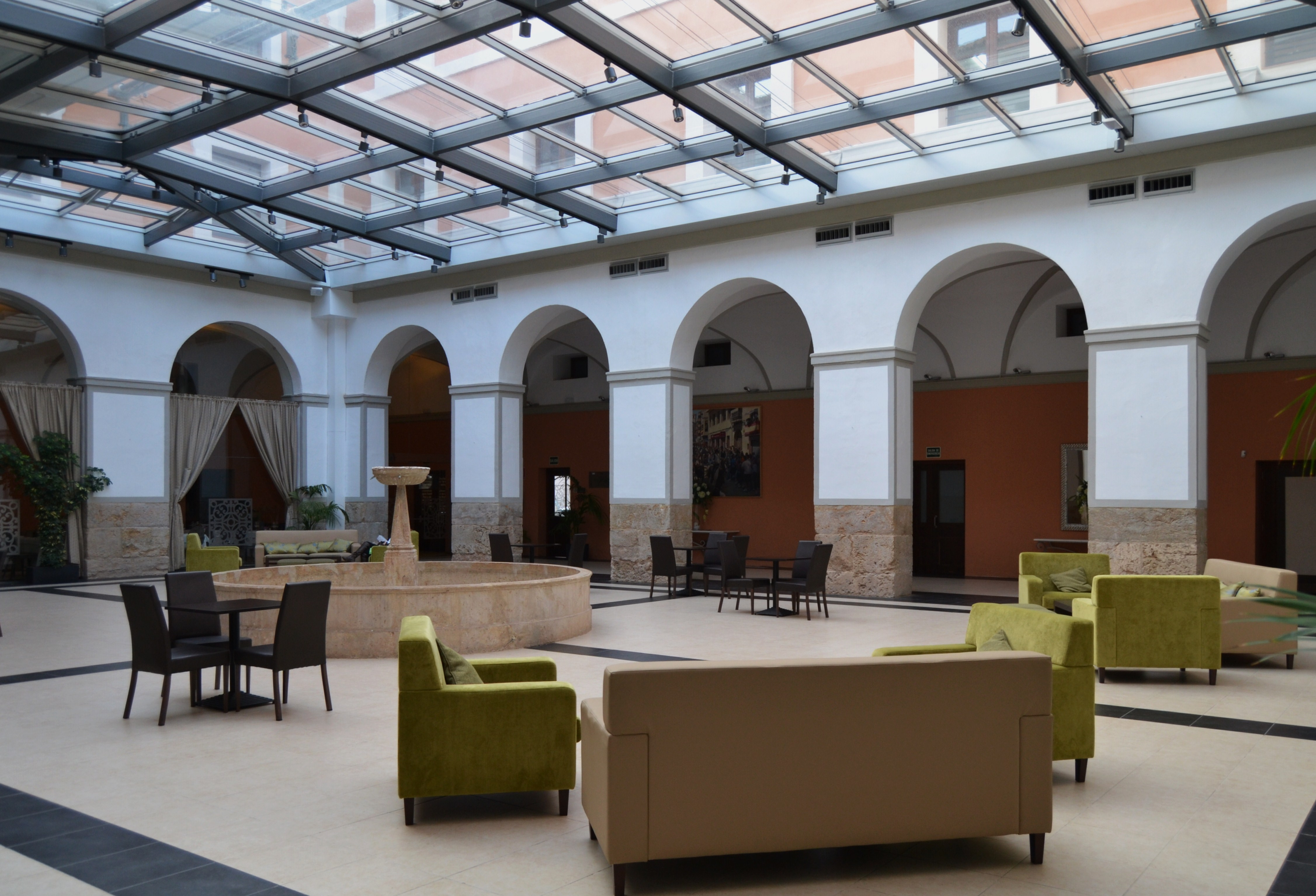 Claustre de l'antic hospital o Casa de la Misericòrdia de Sogorb.